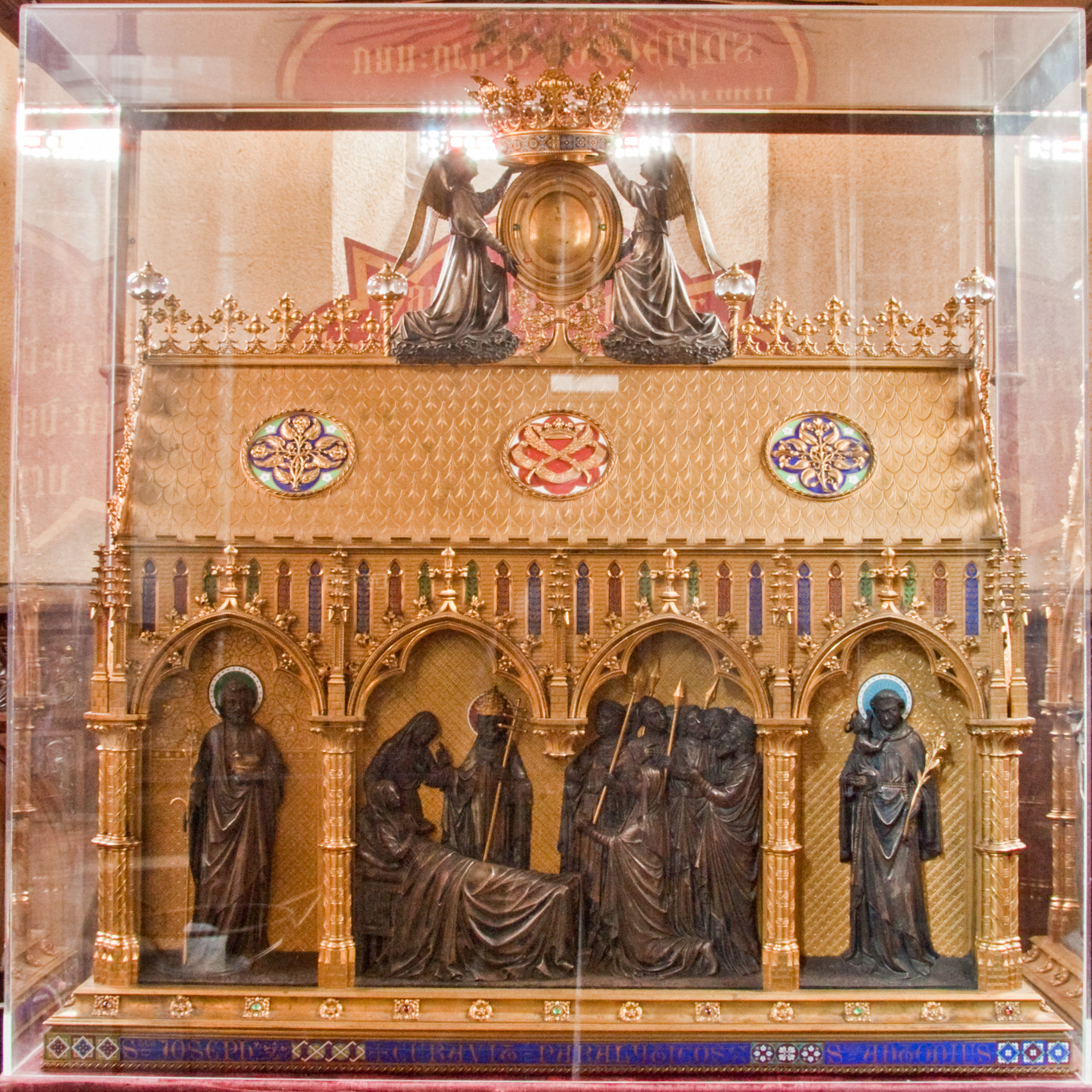 Onze-Lieve-Vrouwekerk (Mariakerke)